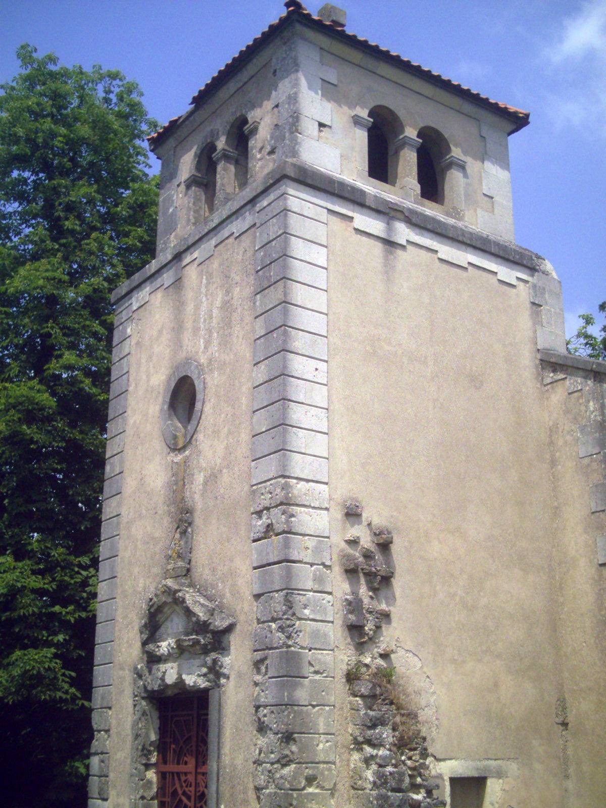 Chapelle de Regniéville